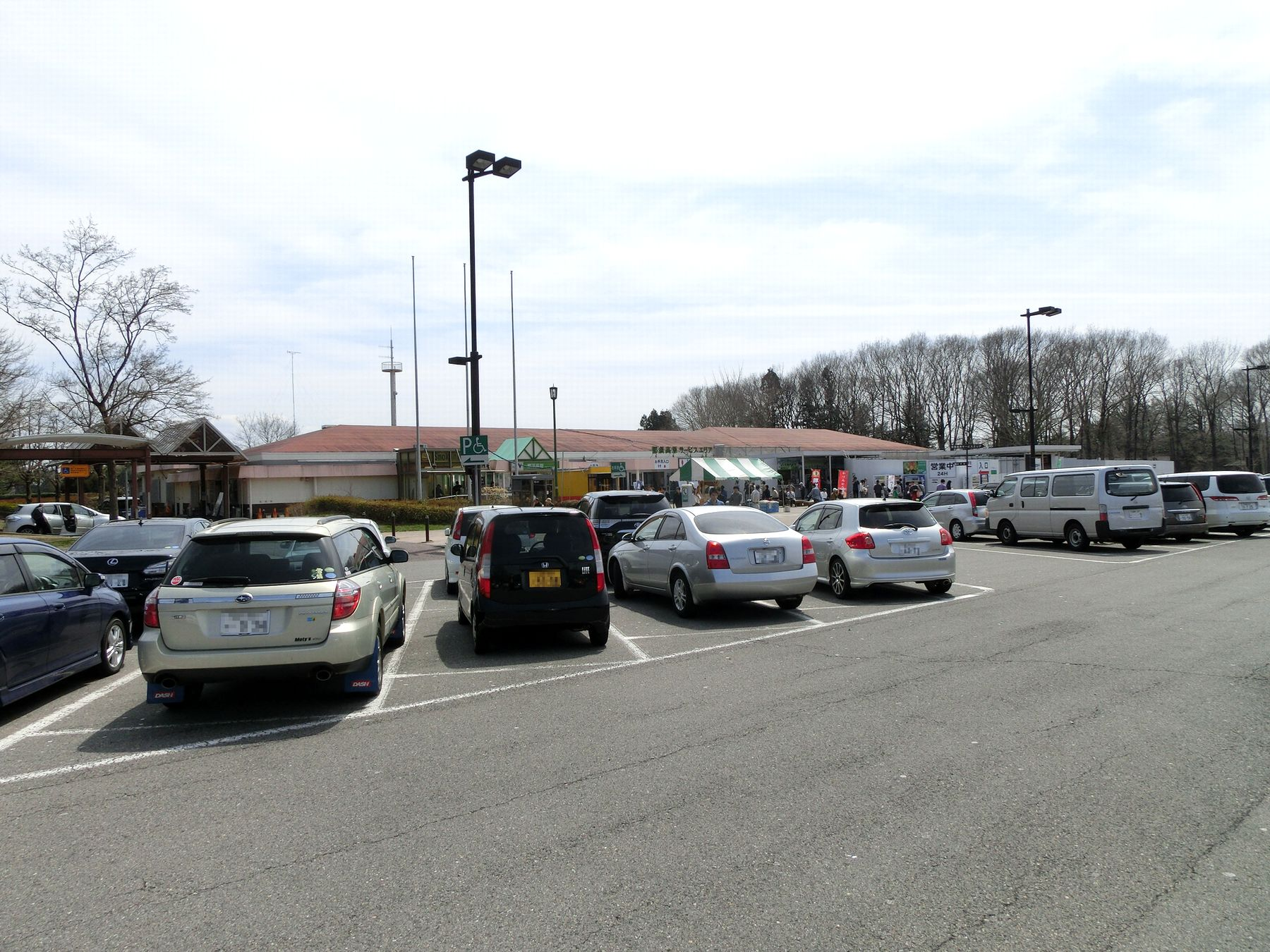 那須高原サービスエリア（上り線）